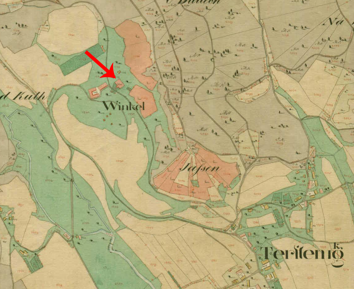 Franciscejski kataster za Kranjsko, 1823-1869